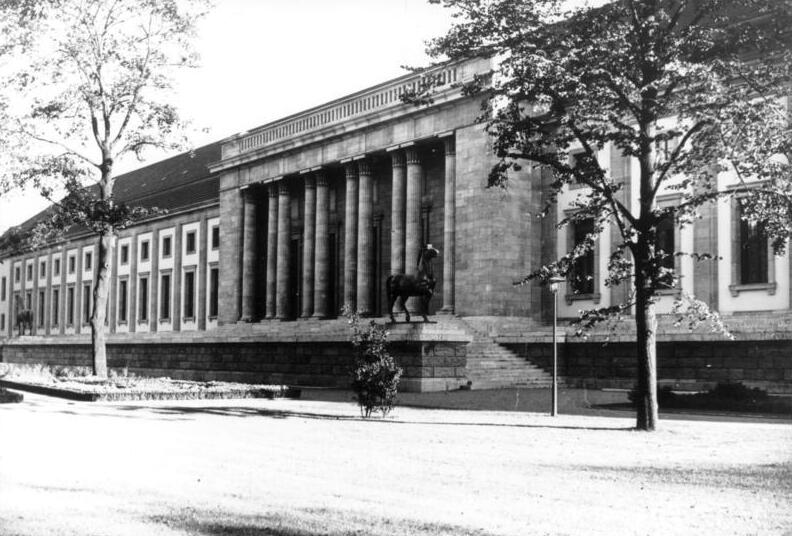 Berlin, Neue Reichskanzlei, Gartenfront ADN-ZB/Archiv, Faschistisches Deutschland 1933-1945 Berlin: Blick auf die Gartenfront der Neuen Reichskanzlei, die nach den Entwürfen des 1937 zum Generalbauinspektor für die Reichshauptstadt ernannten Albert Speer entstanden und am 9. Januar 1939 mit dem Neujahrsempfang für das diplomatische Korps eingeweiht wurde. Der Bau bildete mit seinen 420 Räumen eine Element des faschistischen Konzepts, Berlin zur "neuen Welthauptstadt" auszugestalten. Aufn. Heinrich Hoffmann, 4203-41 [Neue Reichskanzlei nach den Entwürfen von Albert Speer, 1941]